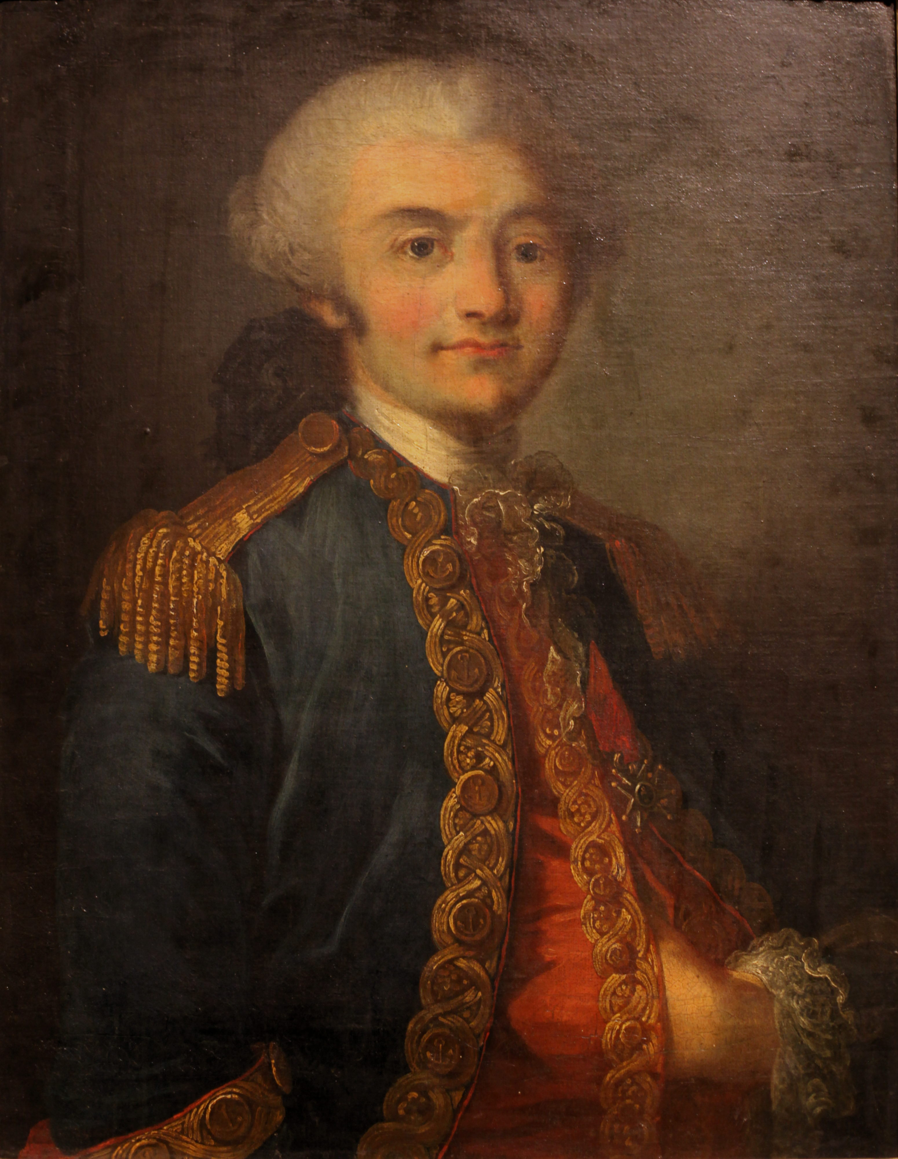 Knight Charles-Marie de Trolong du Rumain (1743-1780)